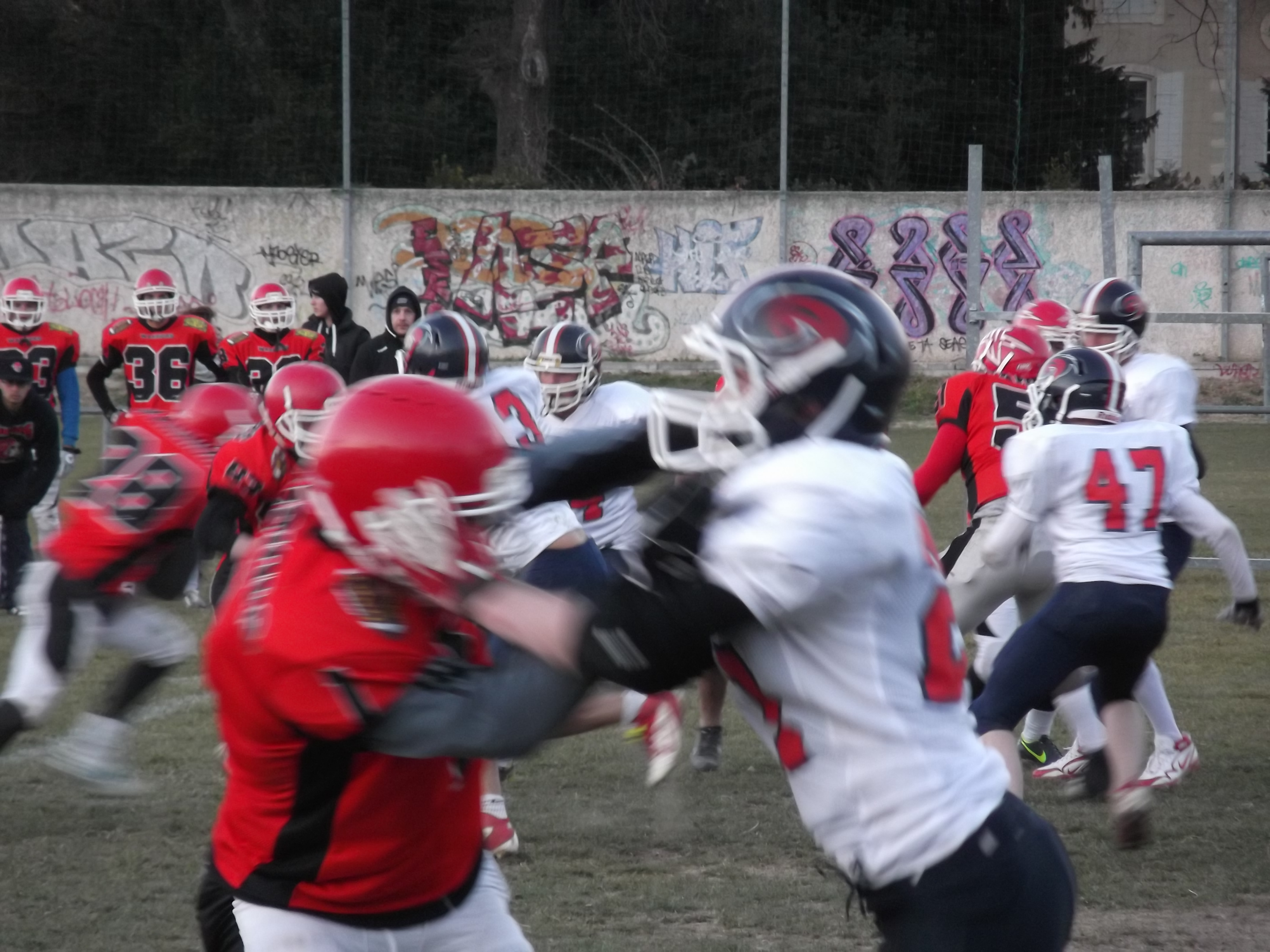 Domaine sportif la Souvine à Montfavet, Avignon (84). Warriors Avignon (en rouge) vs Hurricanes Montpellier (en blanc), championnat U17.